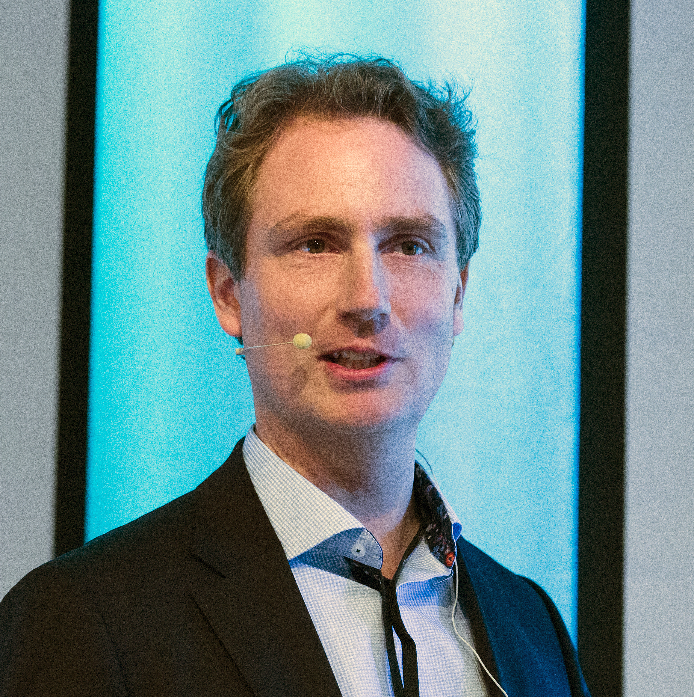 Erik Selin, vd för fastighetsbolaget Balder fotograferad 31 januari 2013 när han talade vid fastighetskonferensen Real Estate Øresund i Malmö Börshus.